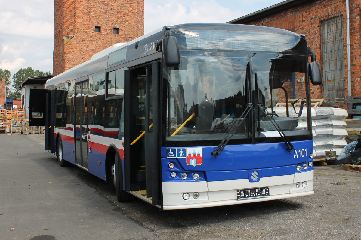 Autobus Solbus Solcity 12 dla MZK Bydgoszcz. This photo was taken during Railway Wikiexpedition 2014 set up by Wikimedia Polska Association in cooperation with Fundacja Grupy PKP. You can see all photographs in category Wikiekspedycja kolejowa 2014.